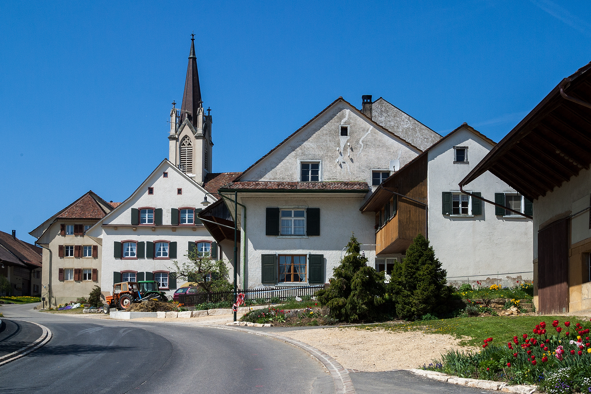 Kilchberg (BL)